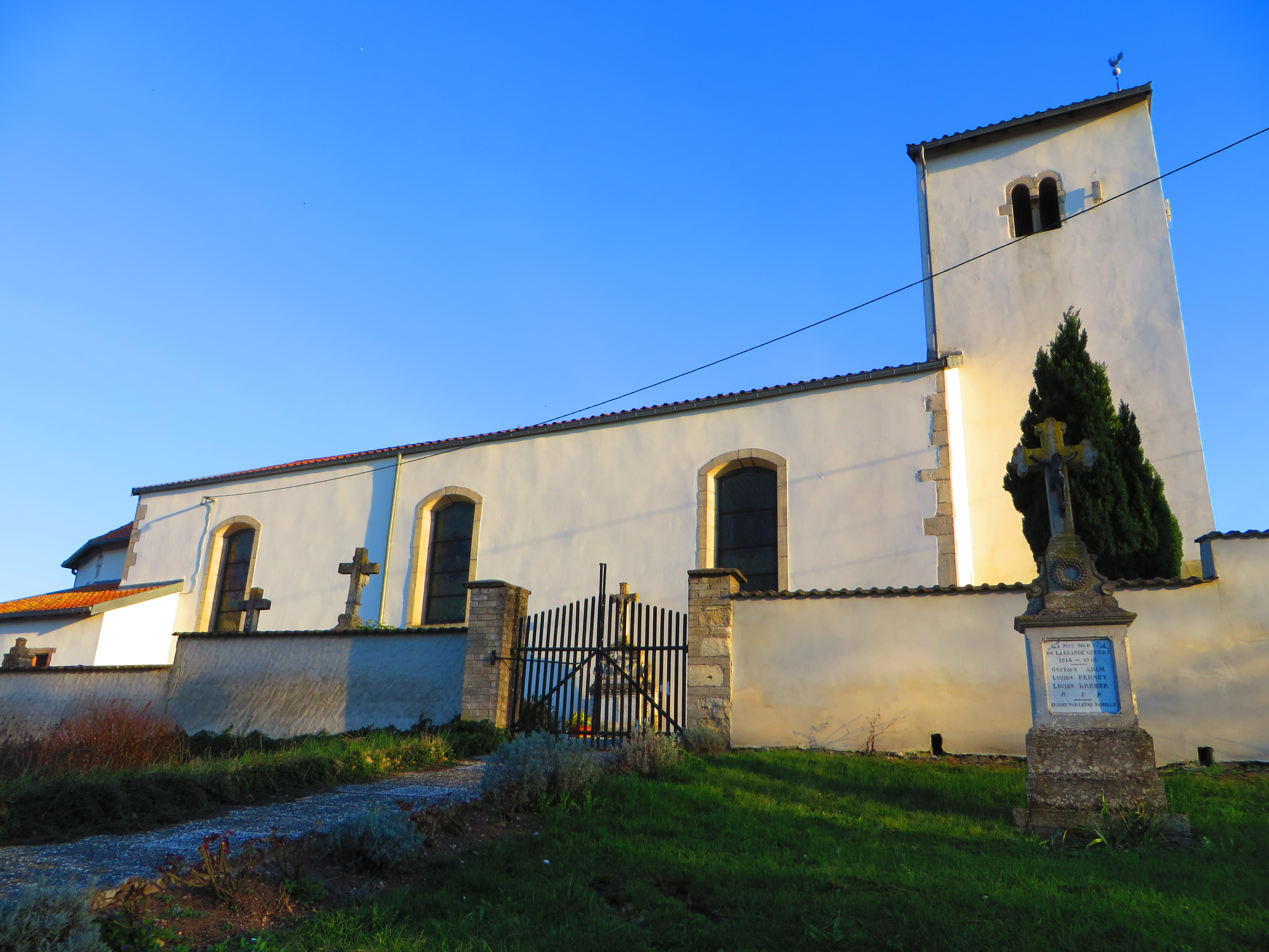 Bellange Église Saint-Marcel